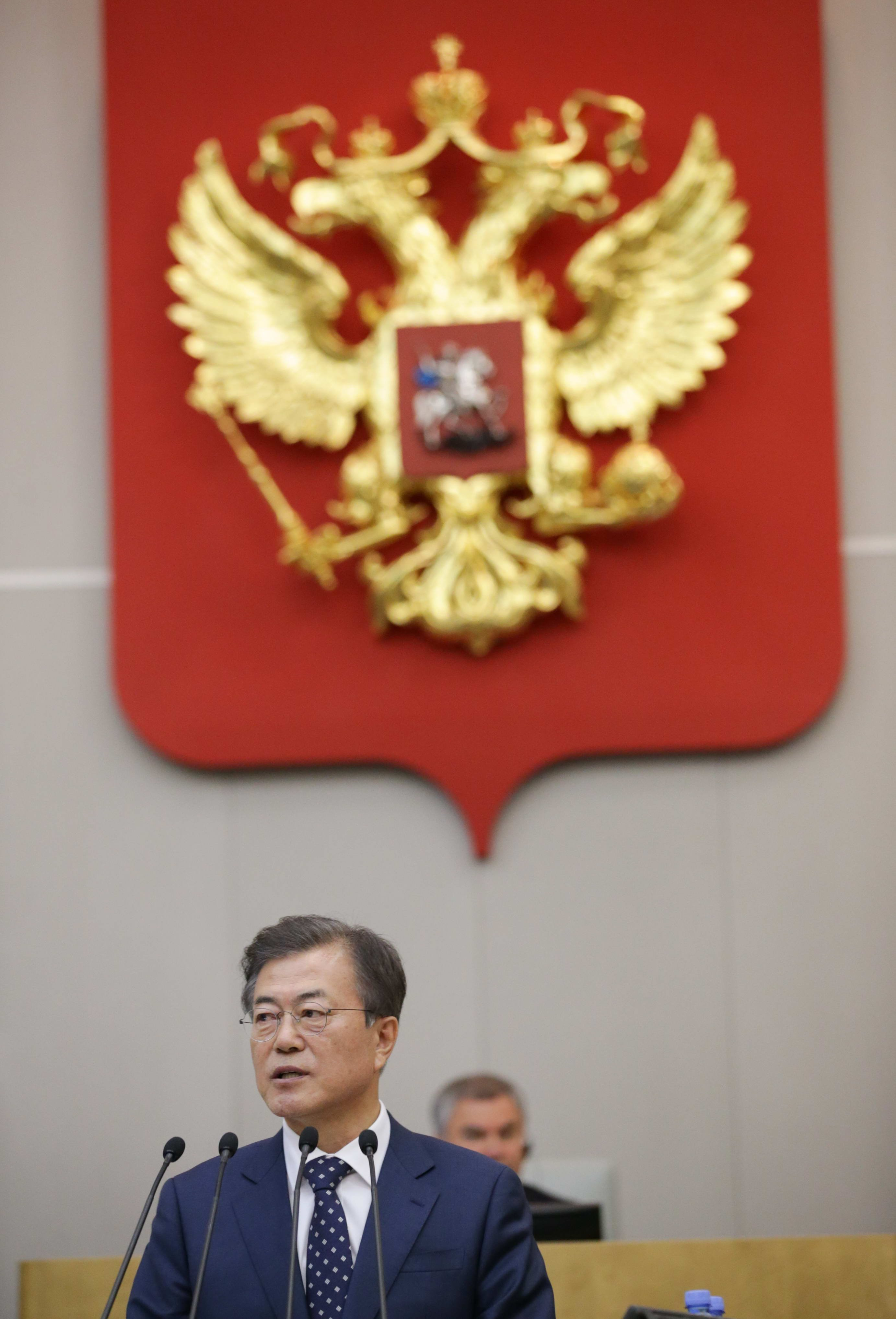 Moon Jae-in in the Russian State Duma (2018-06-21)